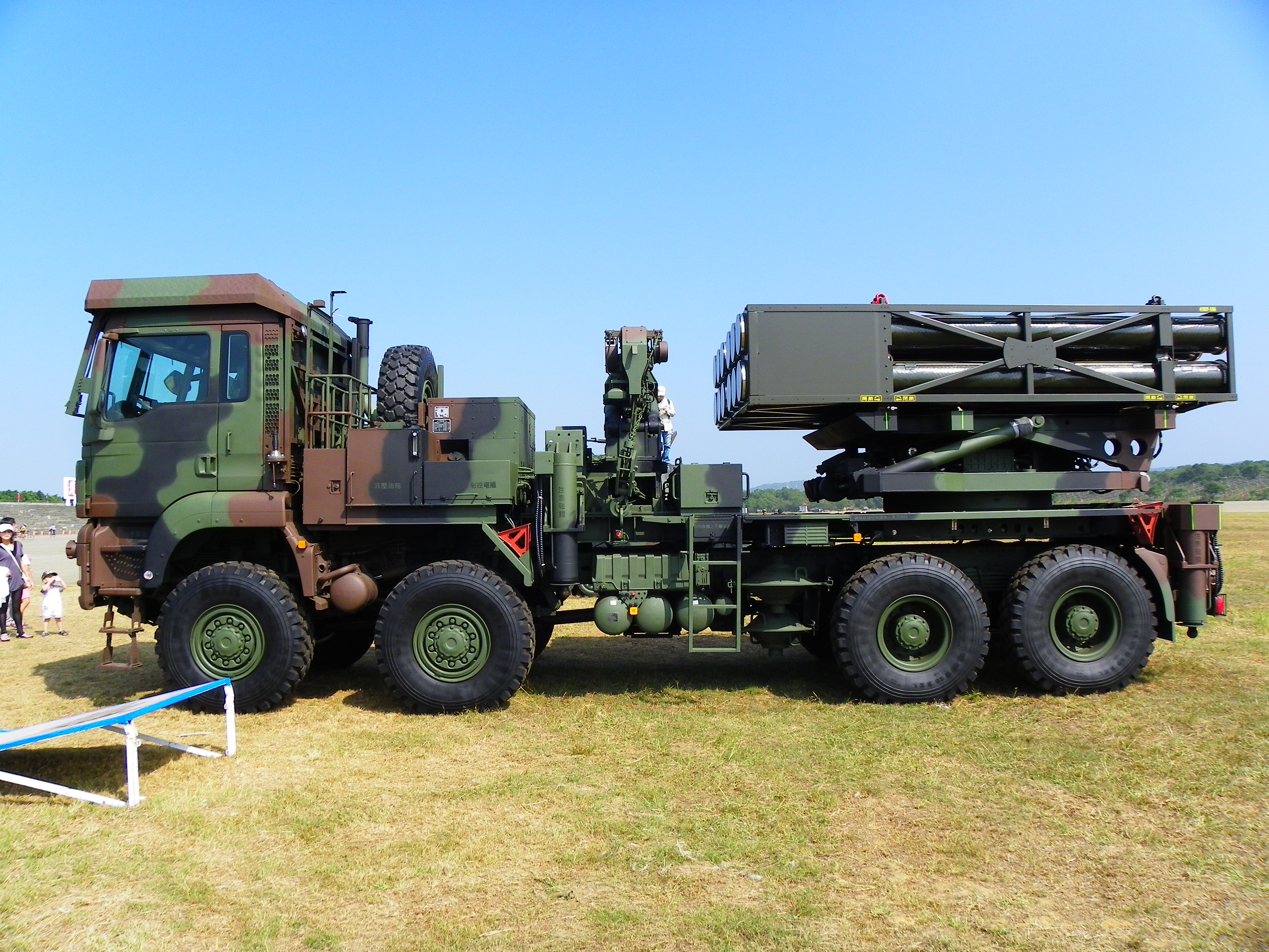 雷霆2000多管火箭系統側面。